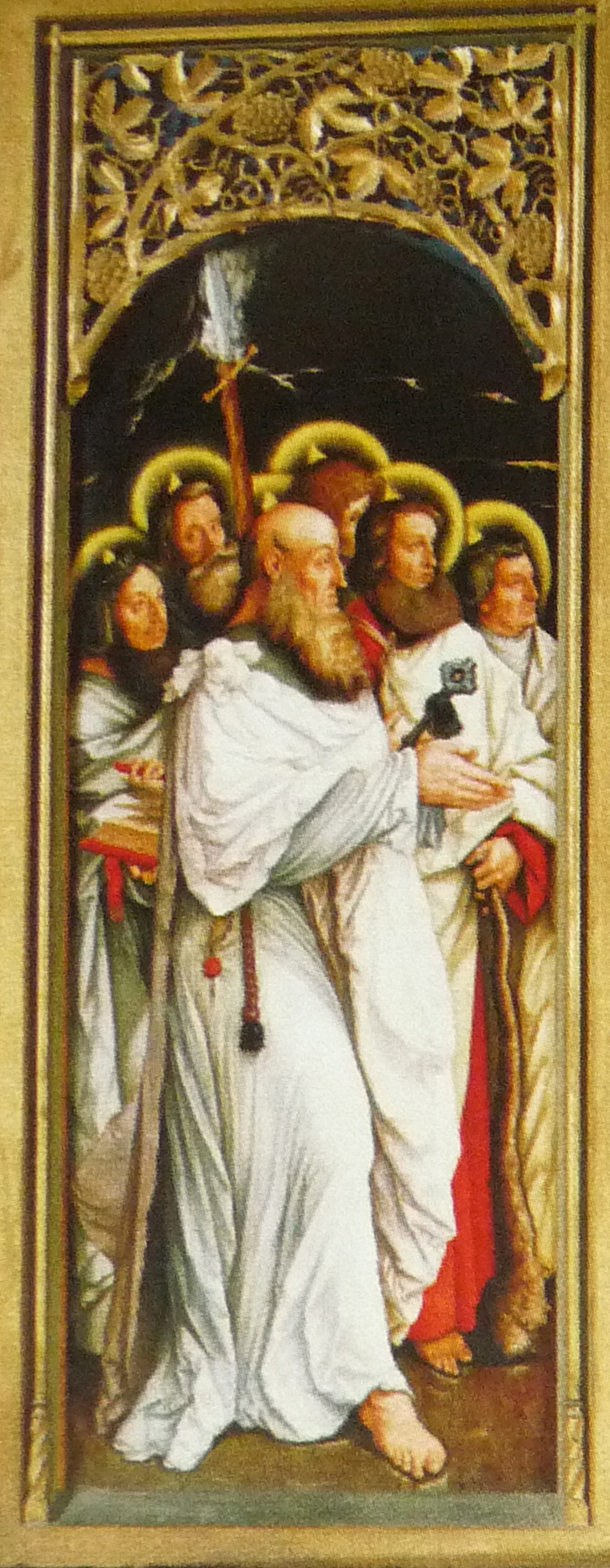 Hans Baldung, altar; Freiburg Minster; detail